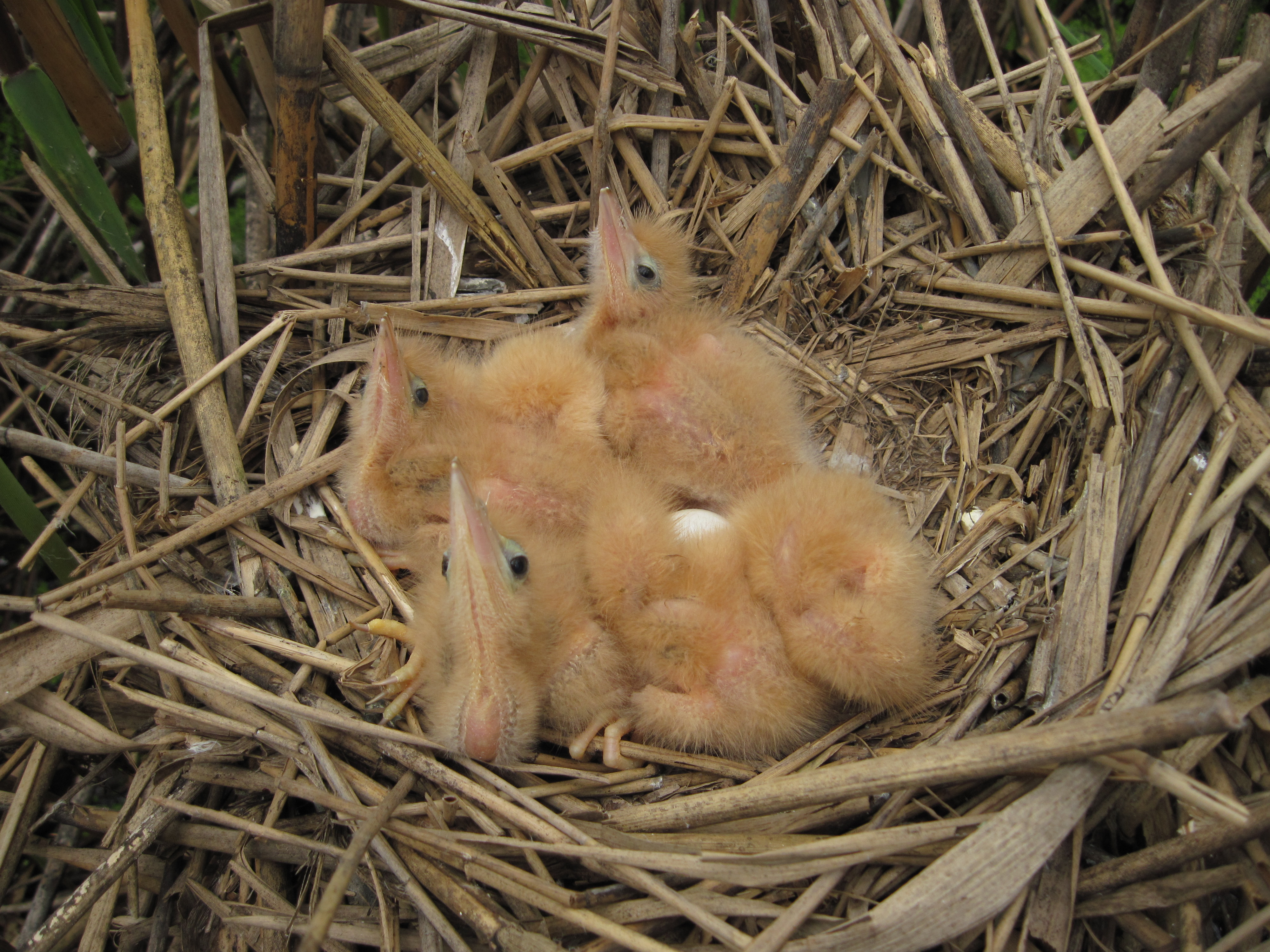 Озеро Больничное: Нижний Новгород, Нижегородская область This image is related to the protected area of Russia number 5210401